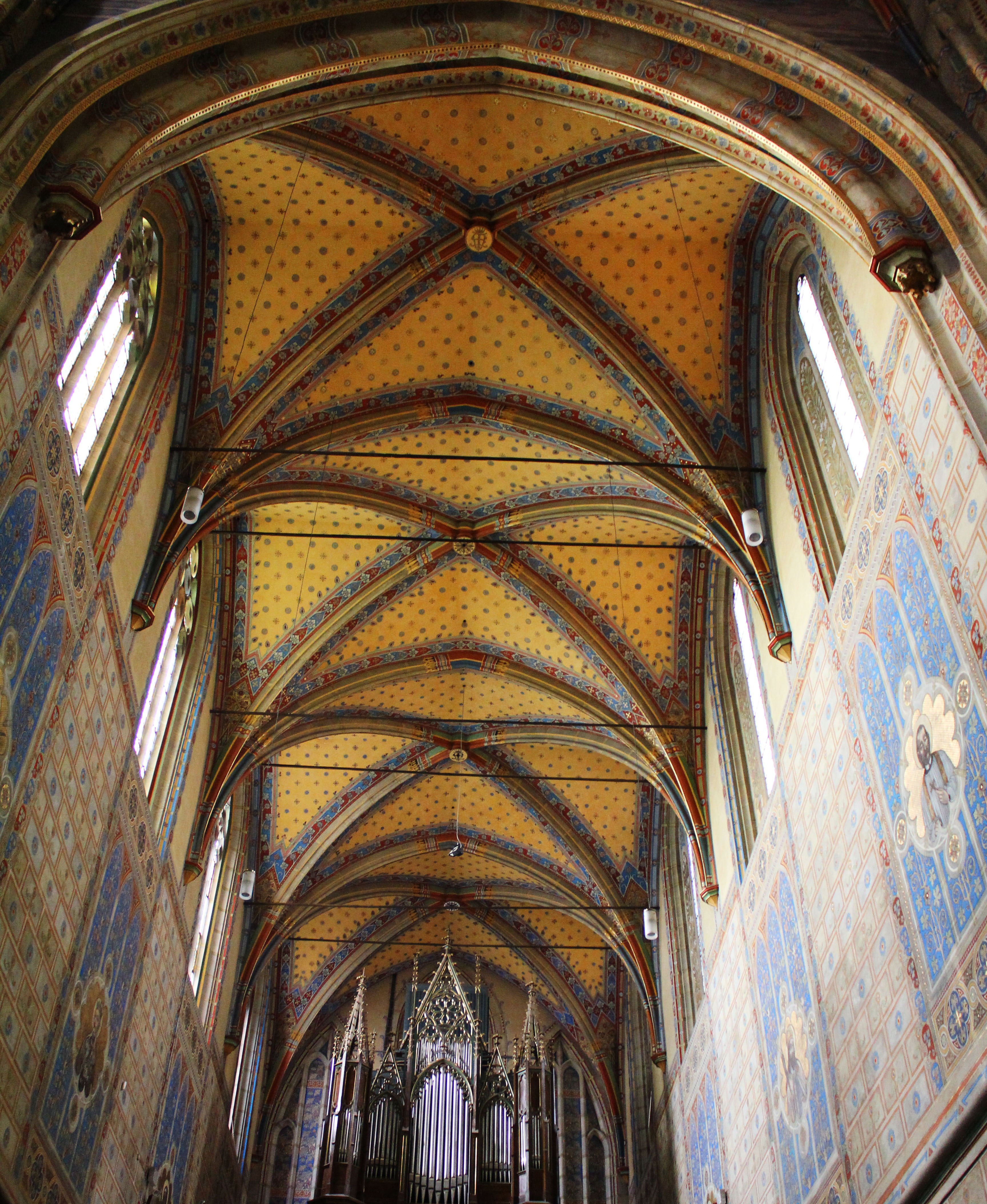 Secesní výmalba (opravy 1898 – 1903) vlivem vzdušné vlhkosti výmalba zpráškovatěla a byla silně znečištěna. Dosud byla obnovena výmalba presbiteria, hlavní lodě a bočního kůru